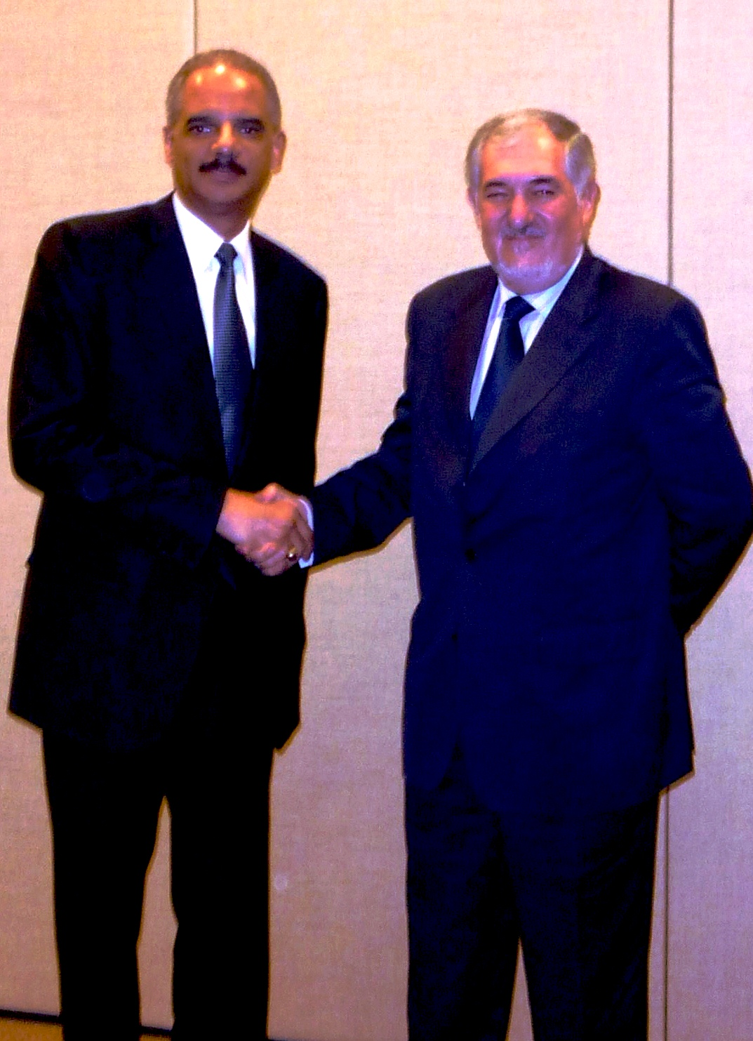 Los Fiscales Generales de España y EEUU, en Brasilia en 2010.